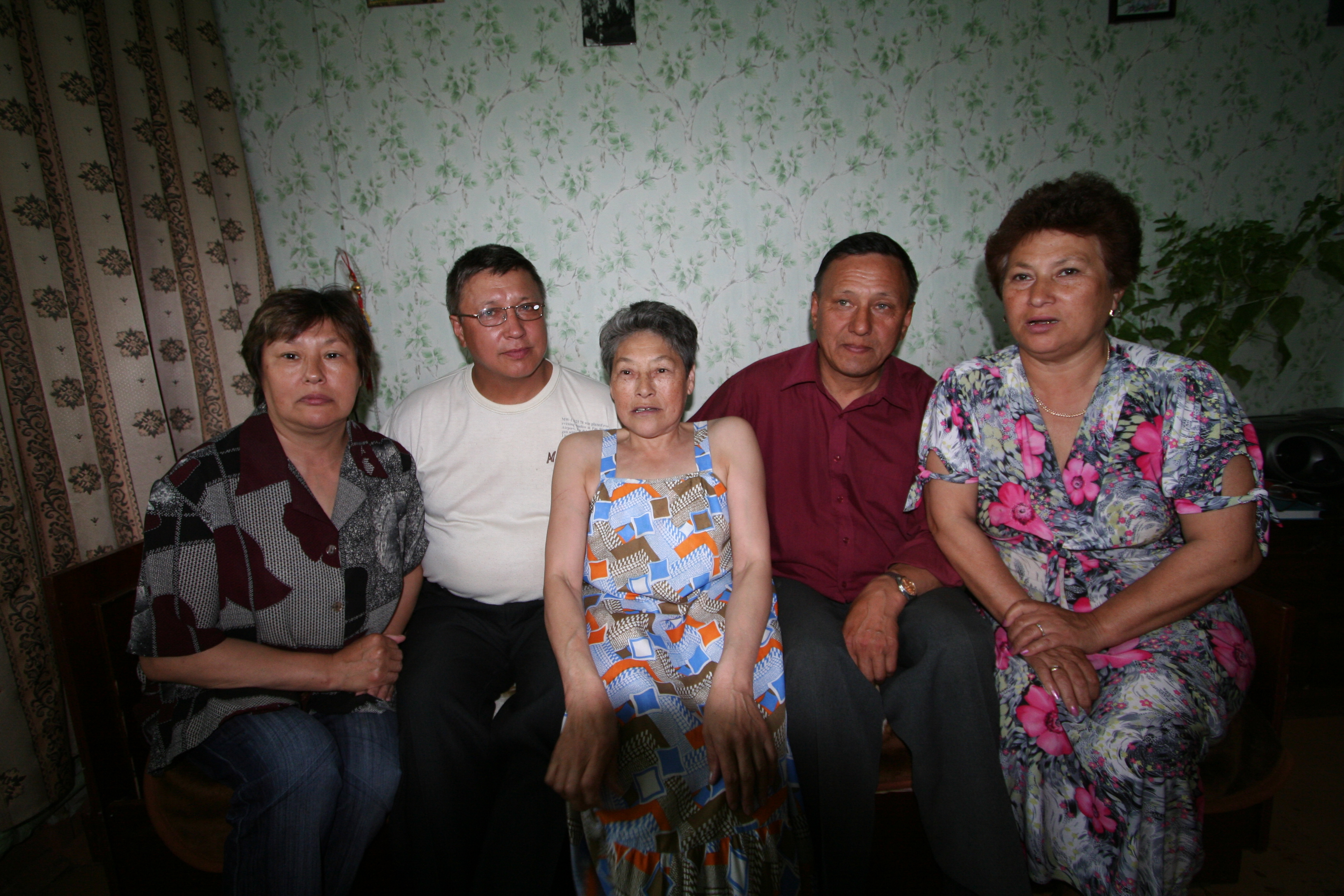 русскоустьинцы